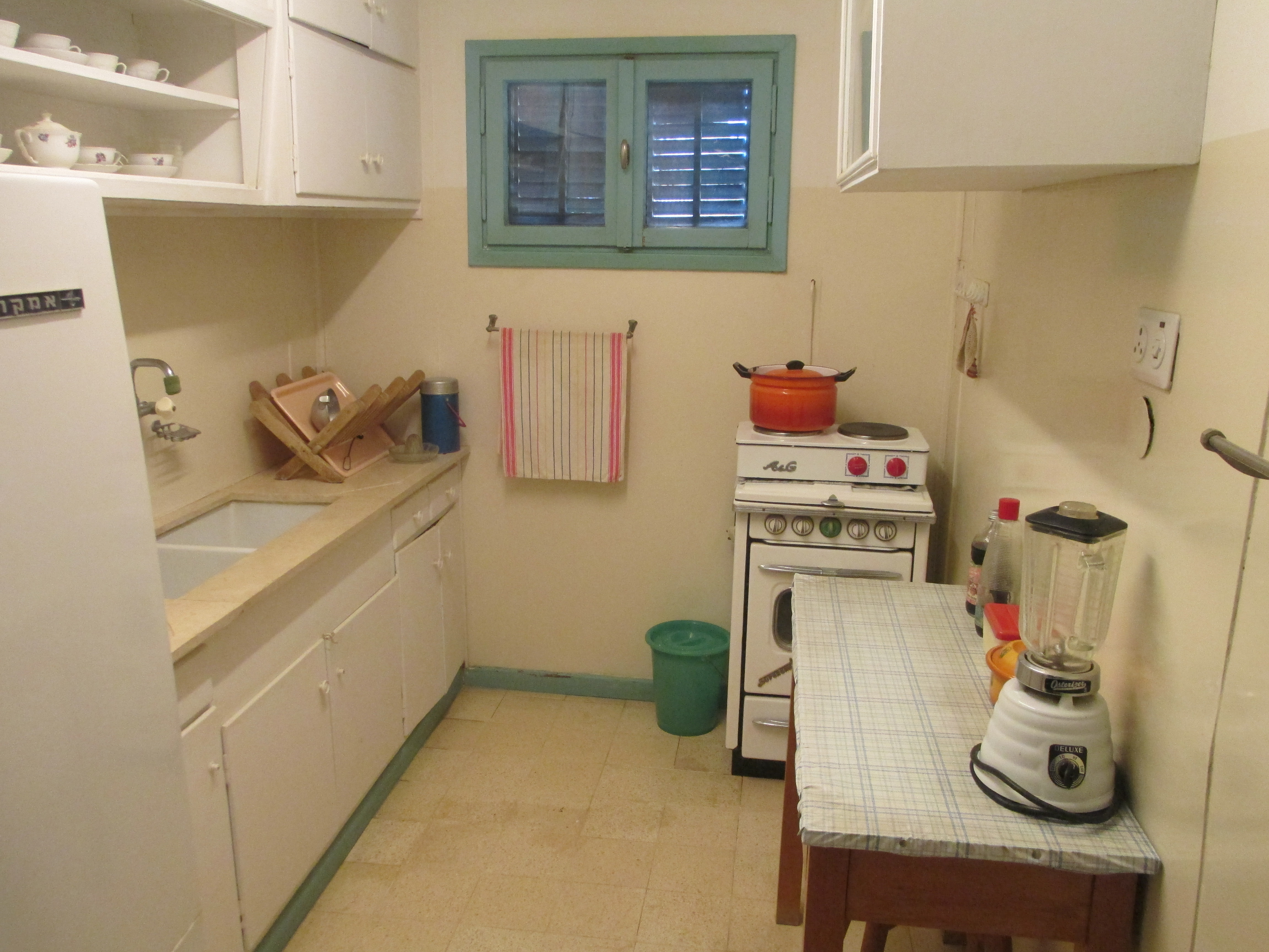 המטבח בצריף בן גוריון בשדה בוקר